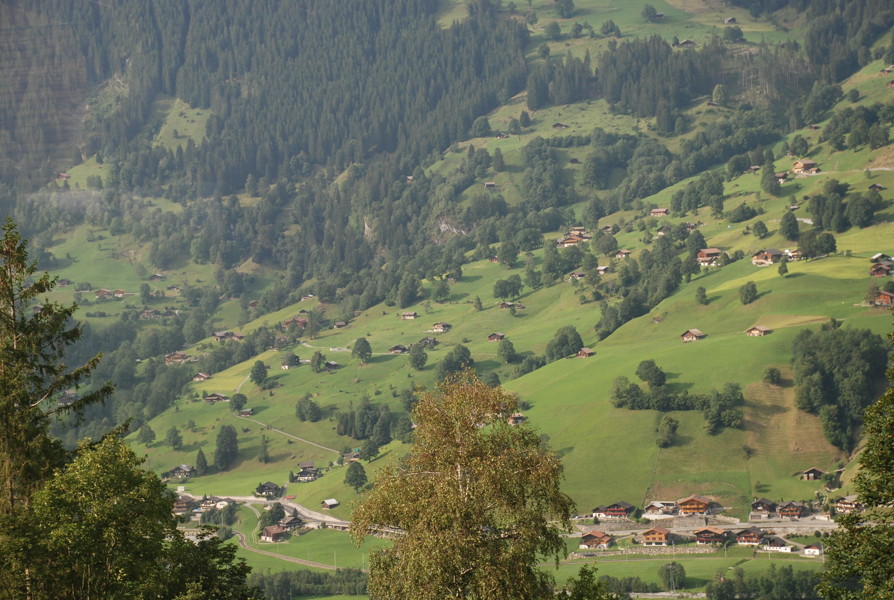 Grindelwald Villages